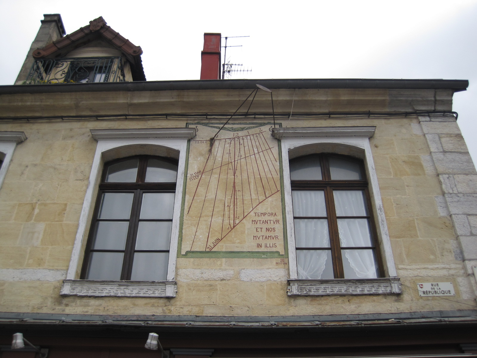 Maison où vécu le Maréchal Joffre, rue de la République à Pontarlier en Franche-Comté avec cadran solaire à disque perforé et analemme de correction du position du soleil - Devise : " Tempora mutantur et nos mutamur in illis " - " Les temps changent et nous, nous changeons avec eux"